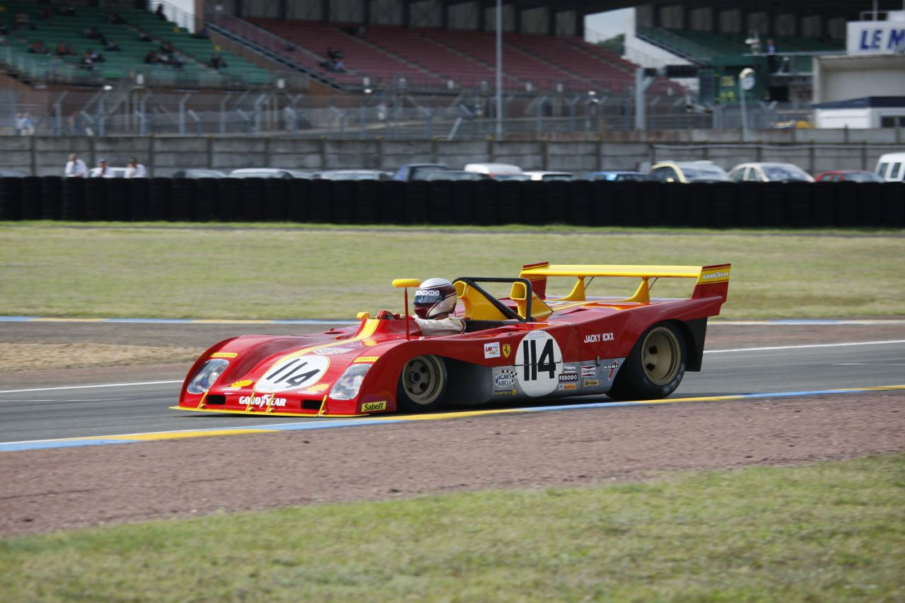 A Ferrari 312P